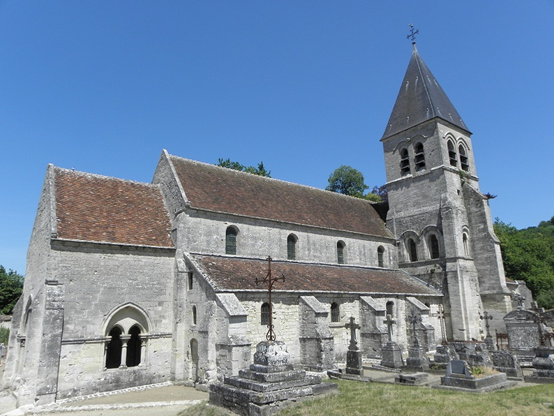 Flanc sud de l'église Saint-Georges de Presles-et-Thierny (02).